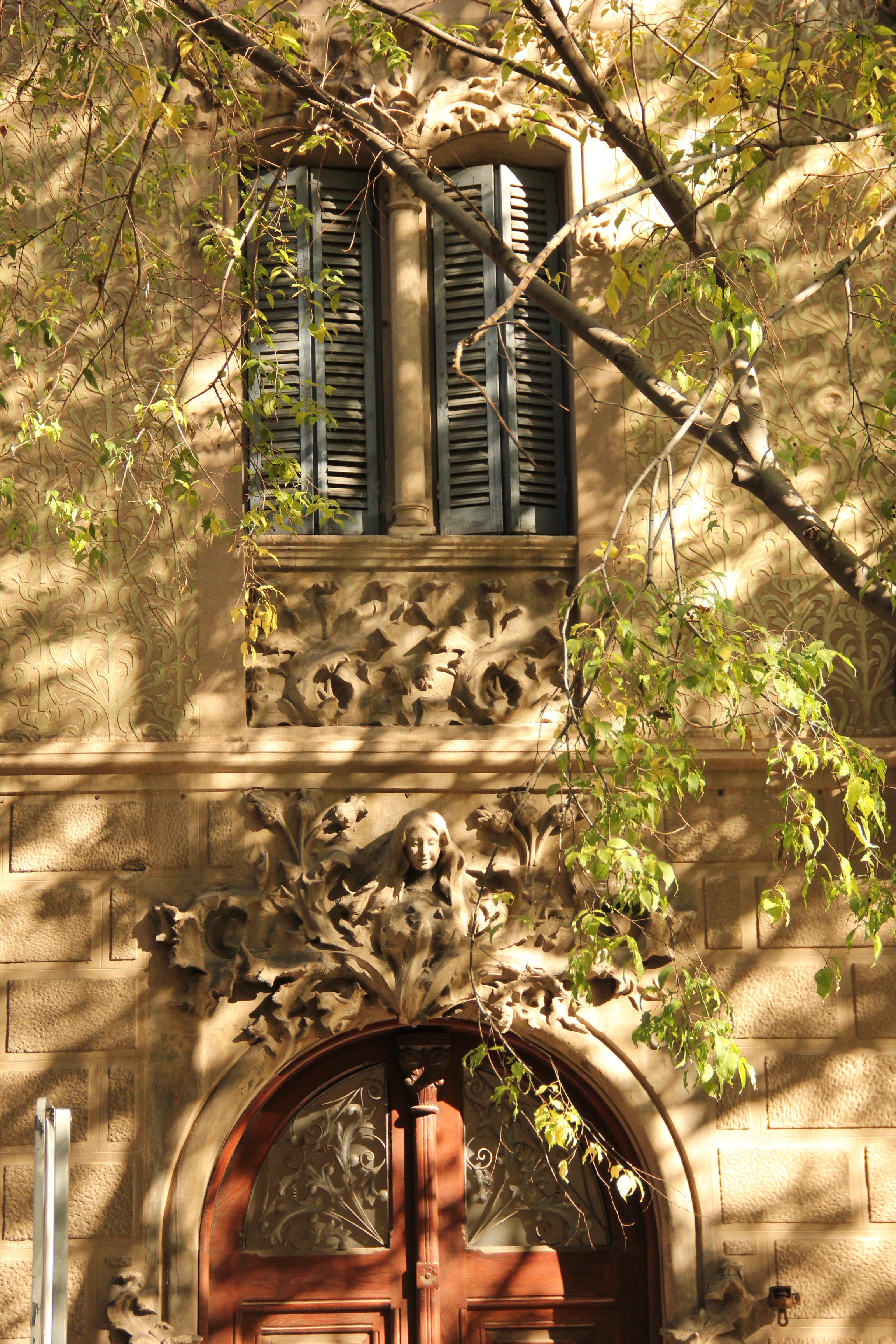 Casa al carrer Viladomat 84 construïda per Josep Graner i Prat